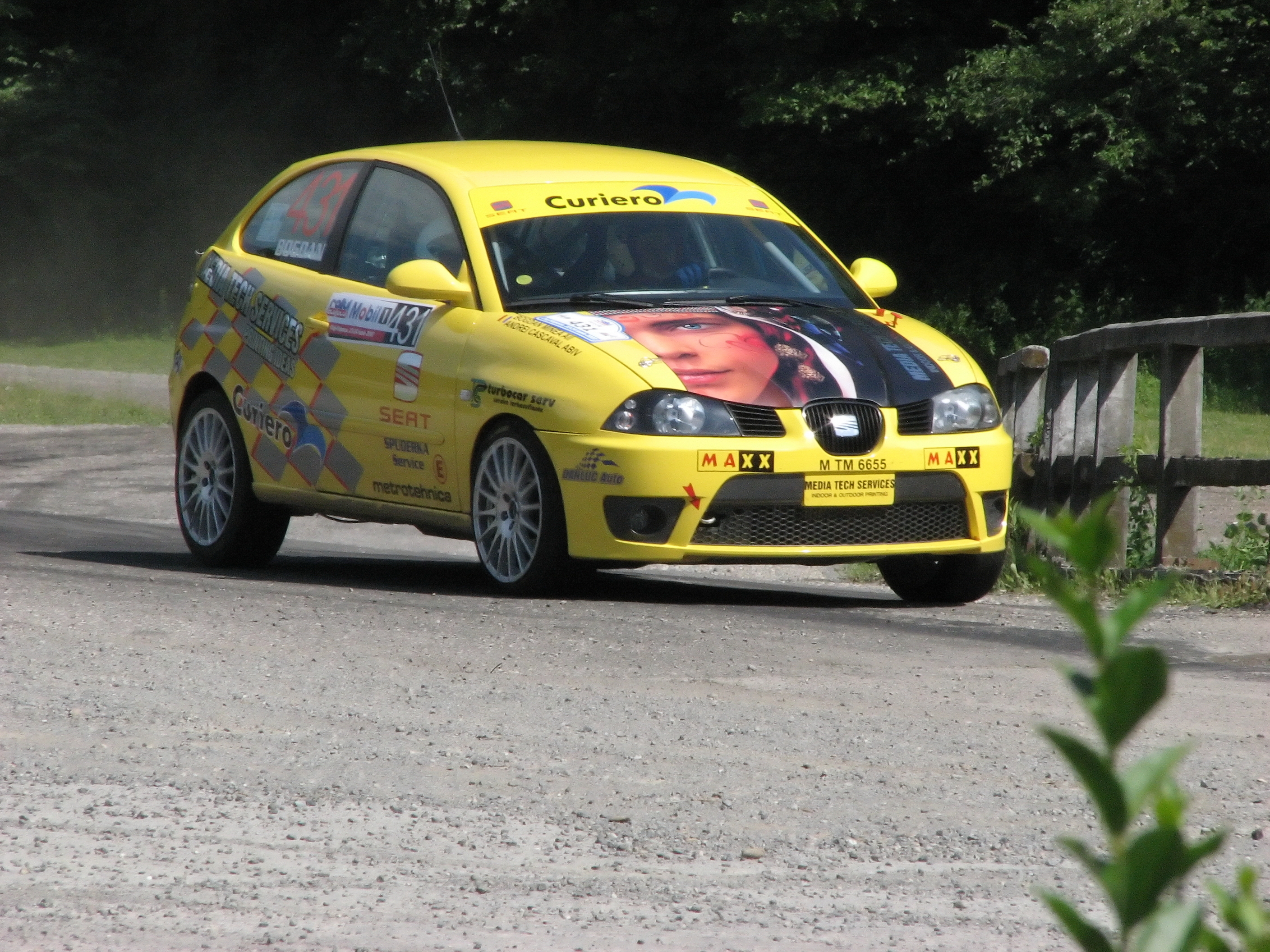 23 Iunie 2007 - etapa 6-a nationala - proba speciala de dupa-amiaza de la Tarnita